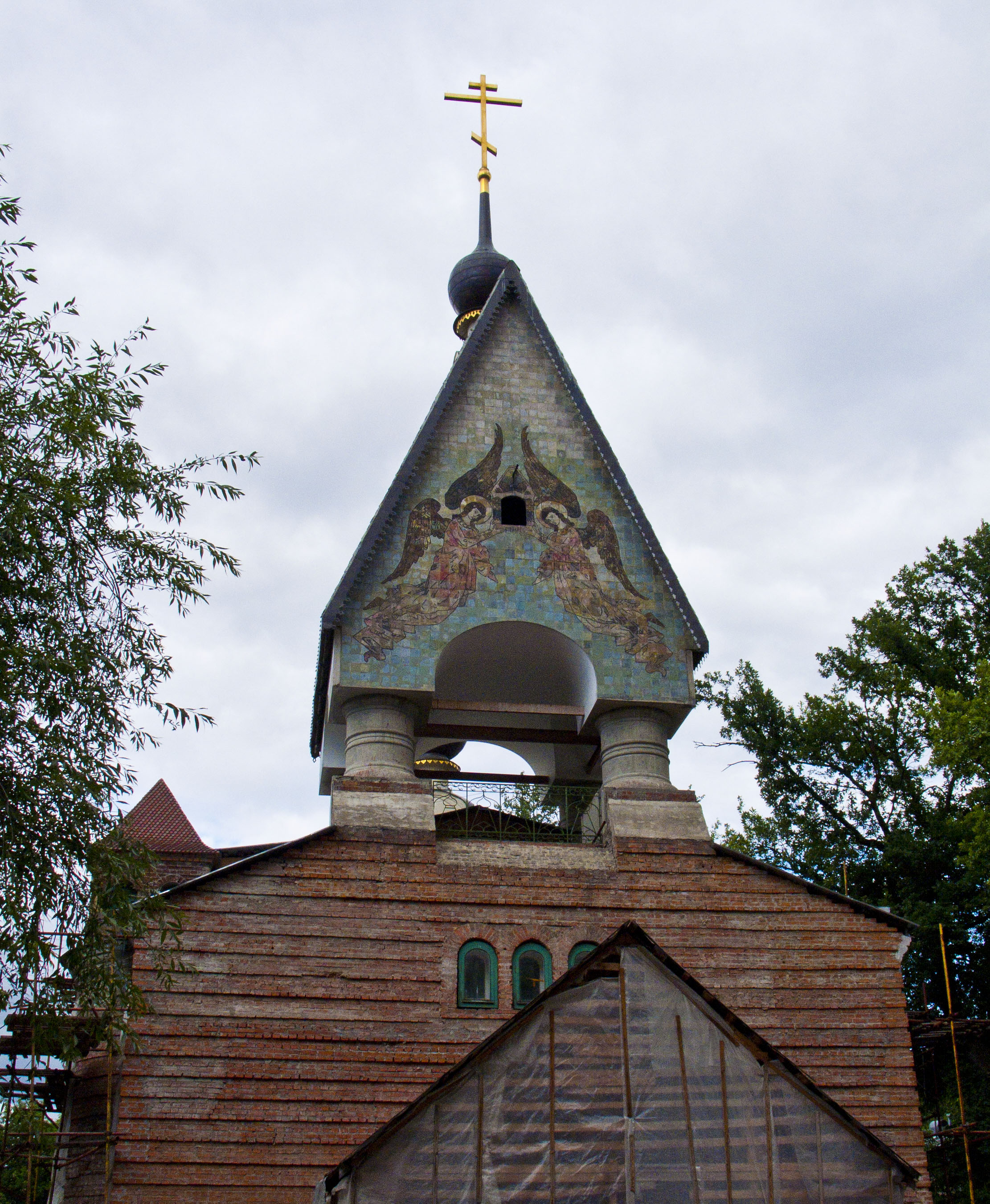 Церковь Воскресения Христова и Покрова Пресвятой Богородицы, старообрядческой общины Поморского согласия (Москва и Московская область, Москва, Токмаков переулок, 17)